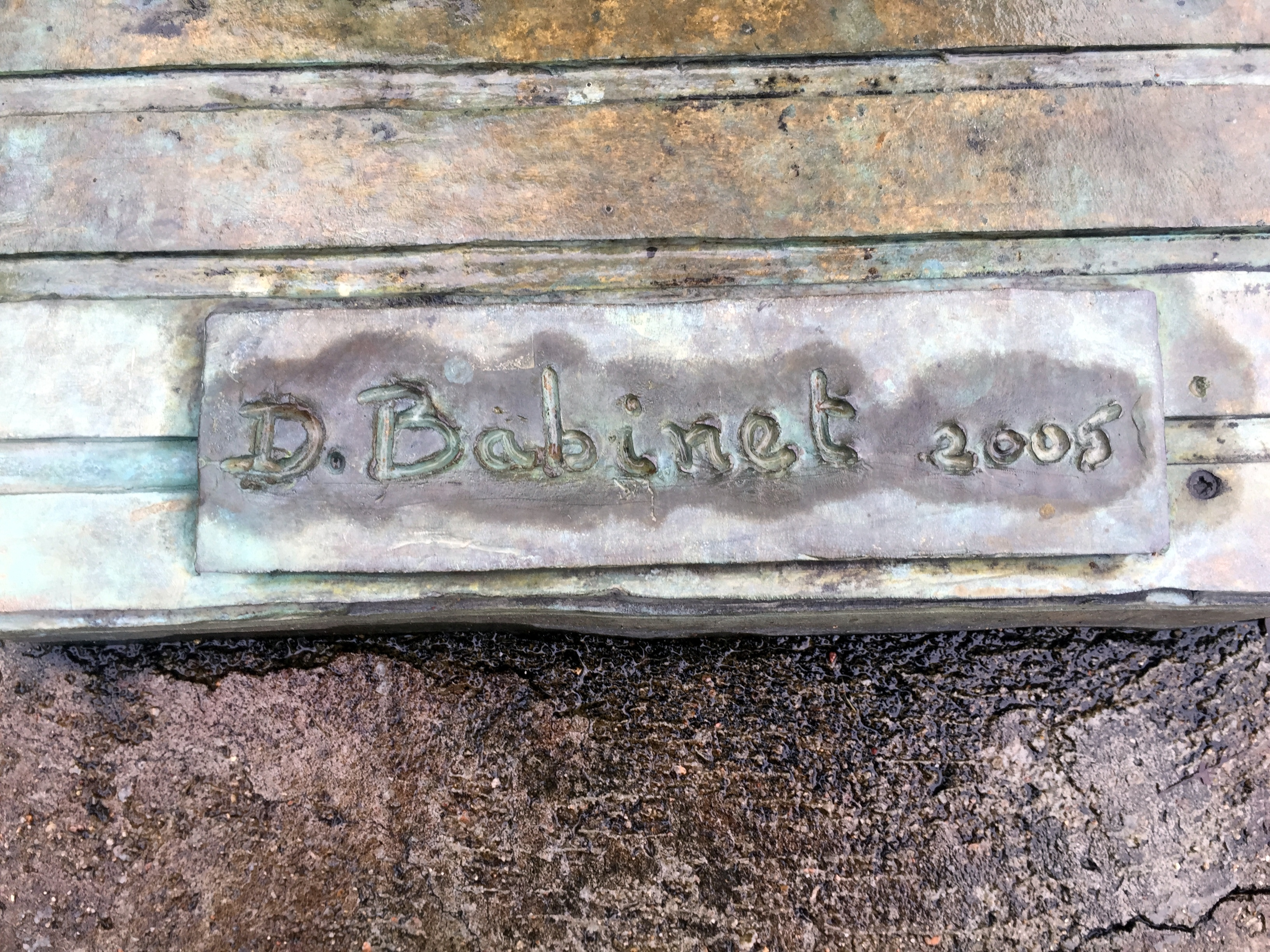 Signature artiste, statue d'Alain Colas, à Clamecy.